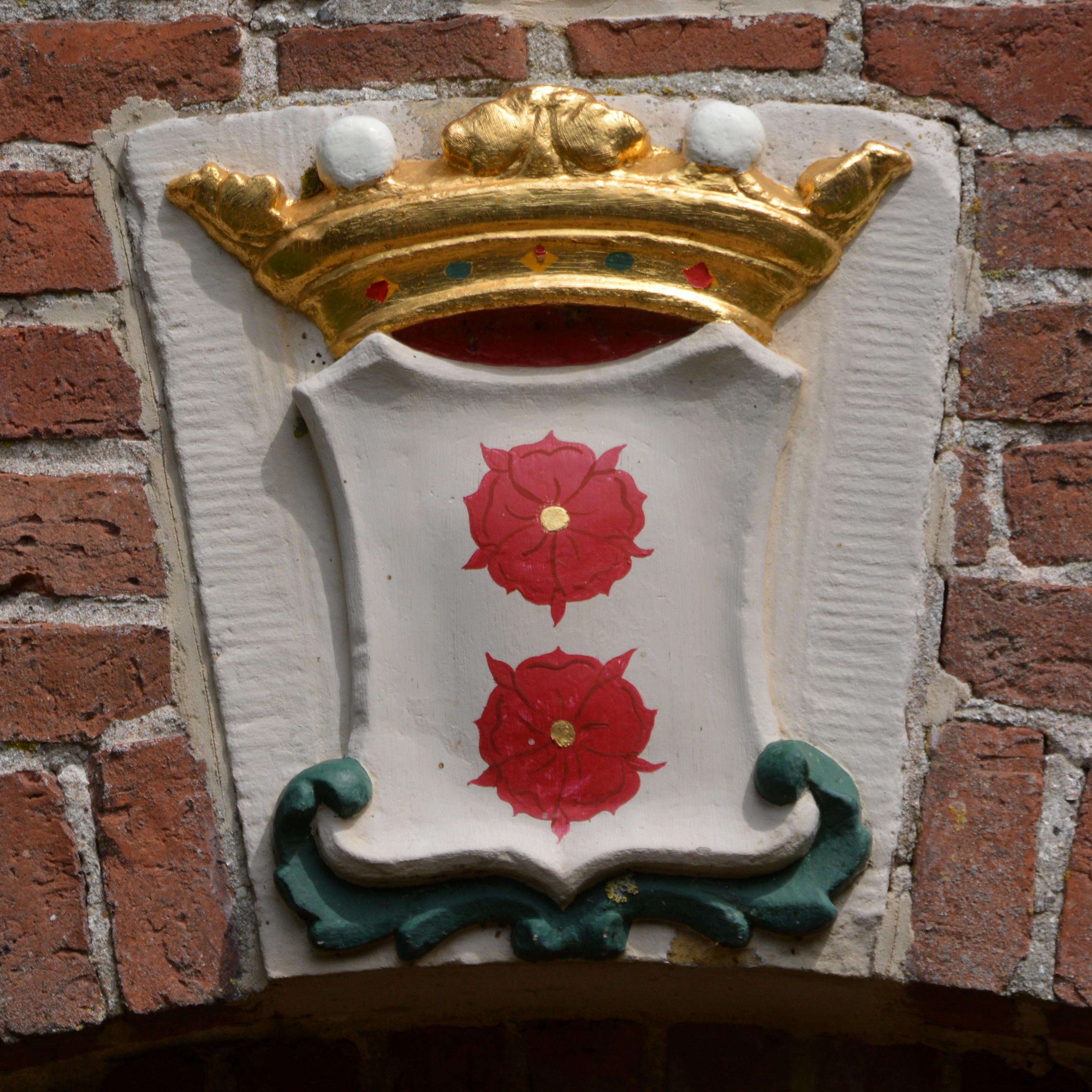 Augsbuurt, hervormde kerk, wapen